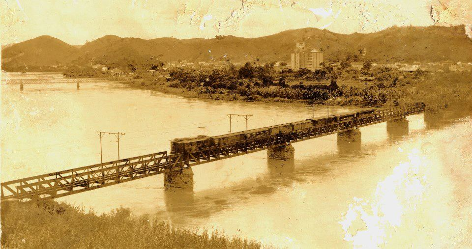 Ponte metálica da linha férrea em Barra Mansa, 1941.